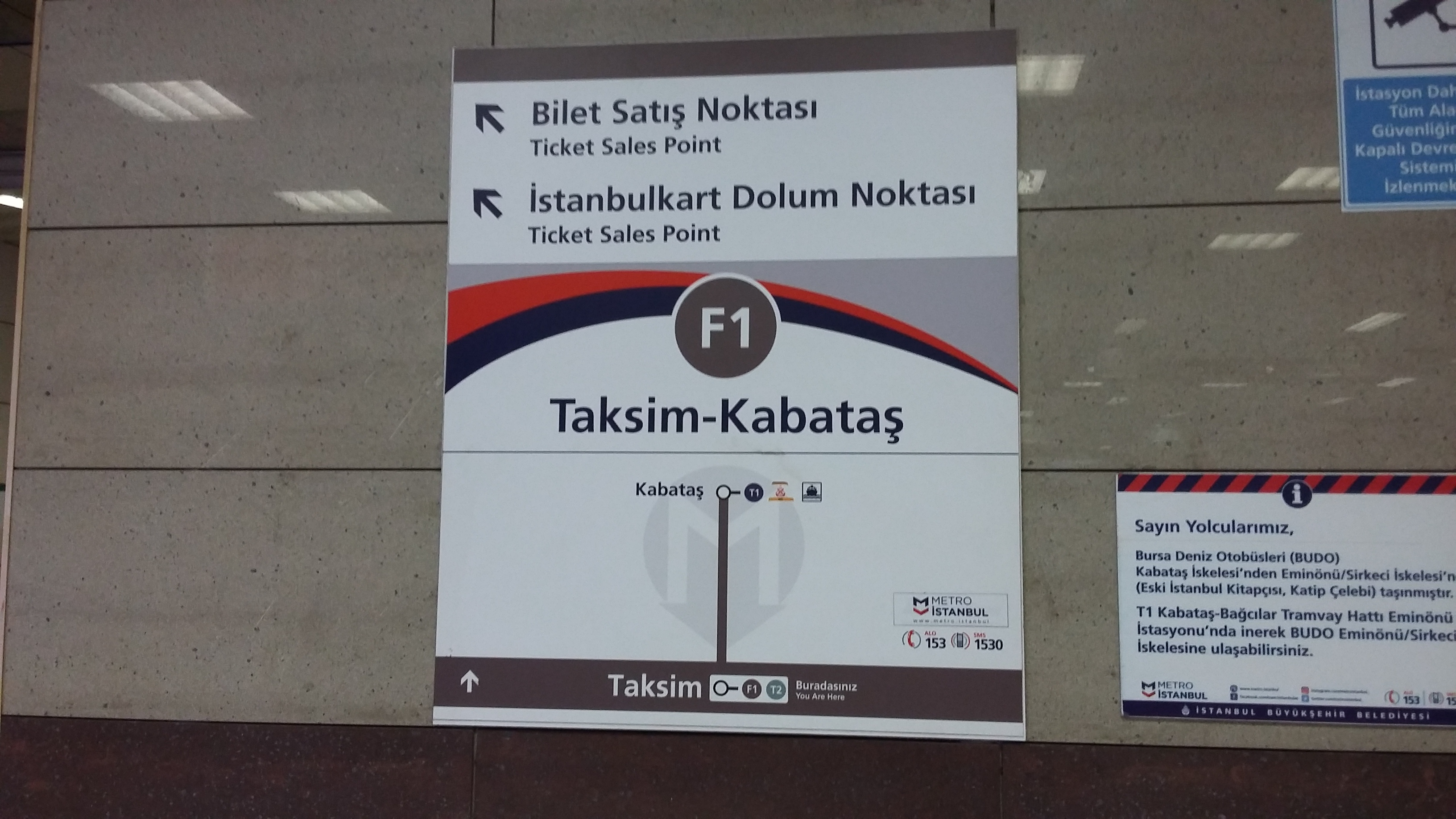 Taksim Kabataş